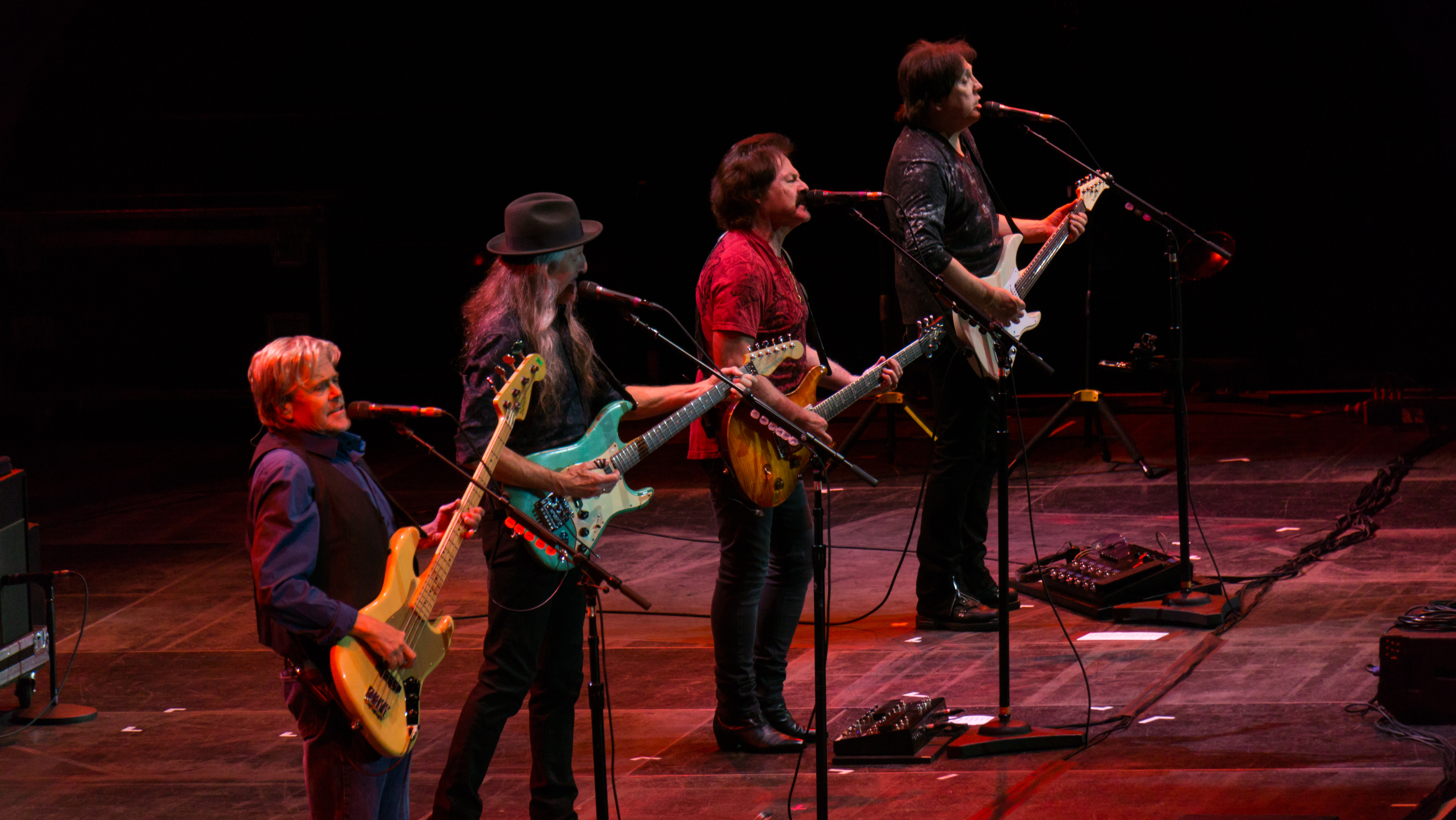 SteelyDanO2291017-2